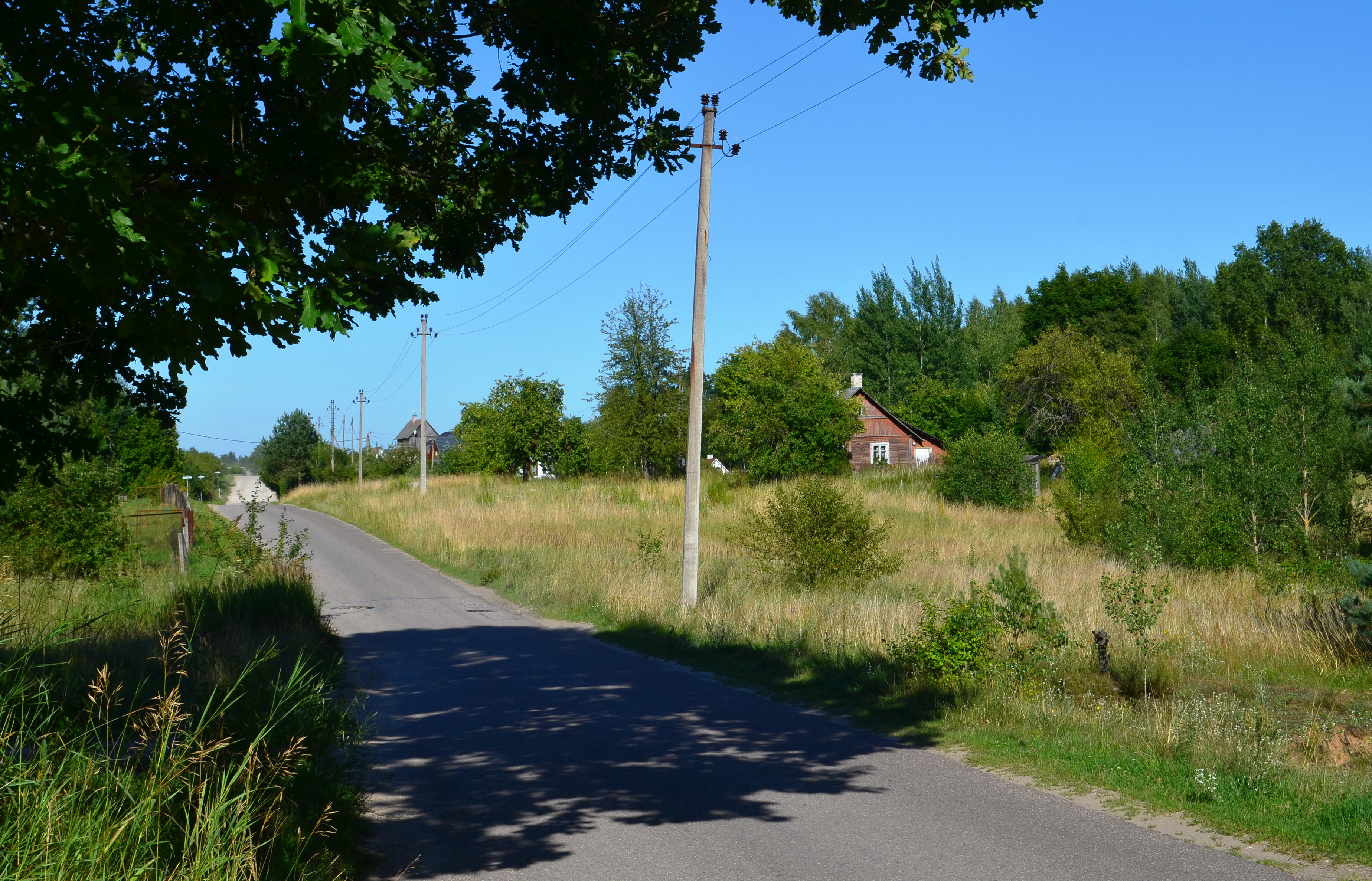 Vilkiškės, Vilniaus r.